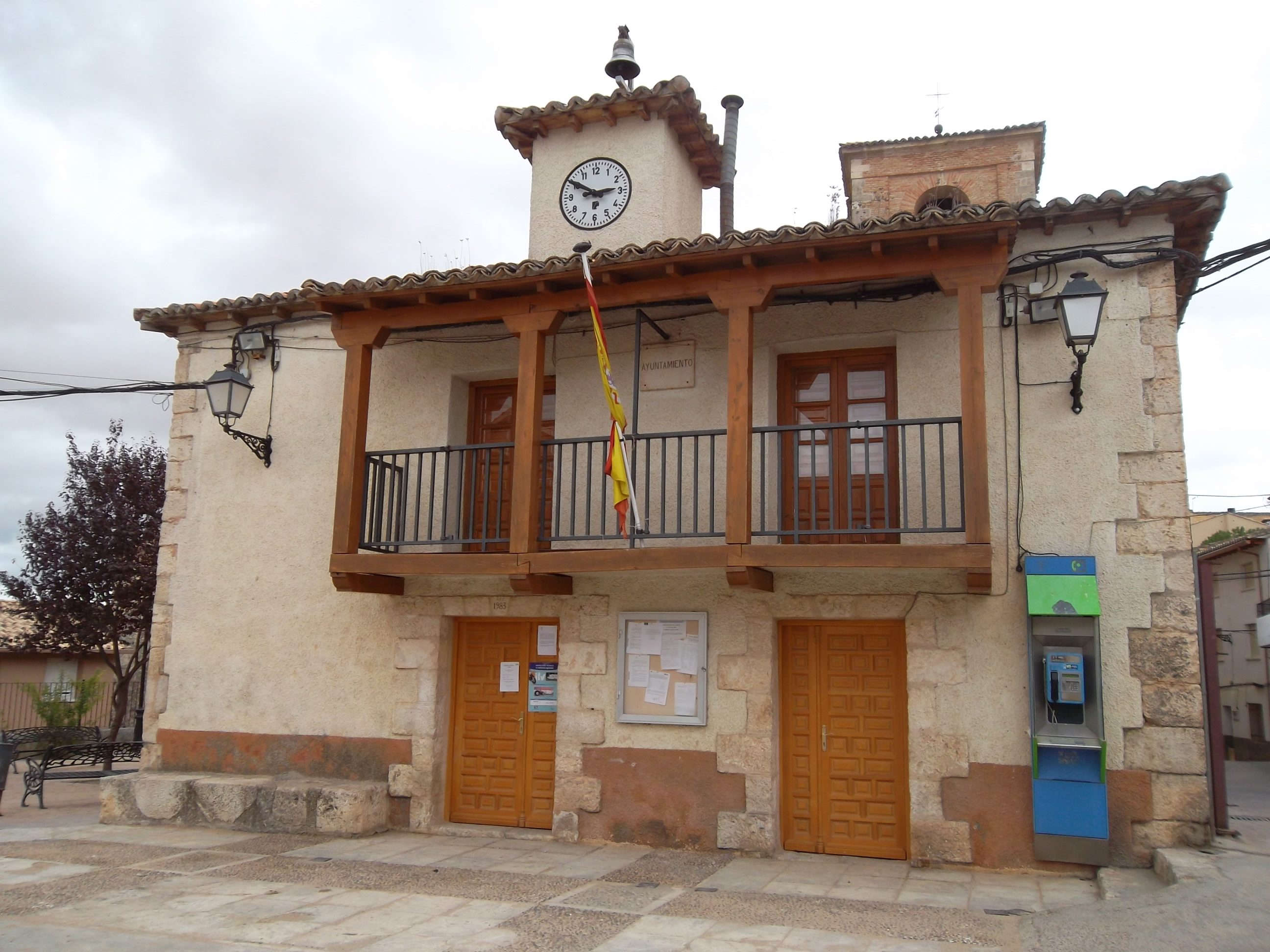 Peñalver-Edificio casa del Ayuntamiento